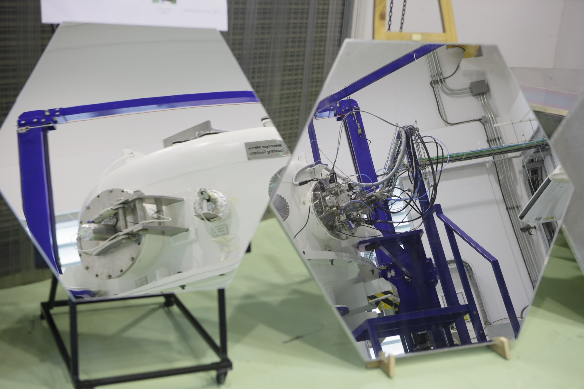 กระจกกล้องโทรทรรศน์ที่ใช้ในโครงการหมู่กล้องโทรทรรศน์รังสีเชเรนคอฟ เพื่อทำการทดสอบการเคลือบกระจก